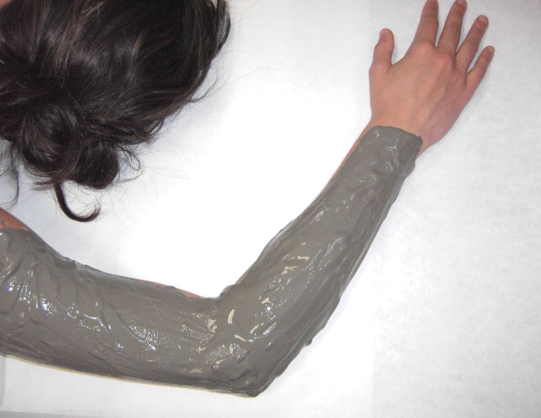 Aplicación de peloide en brazo